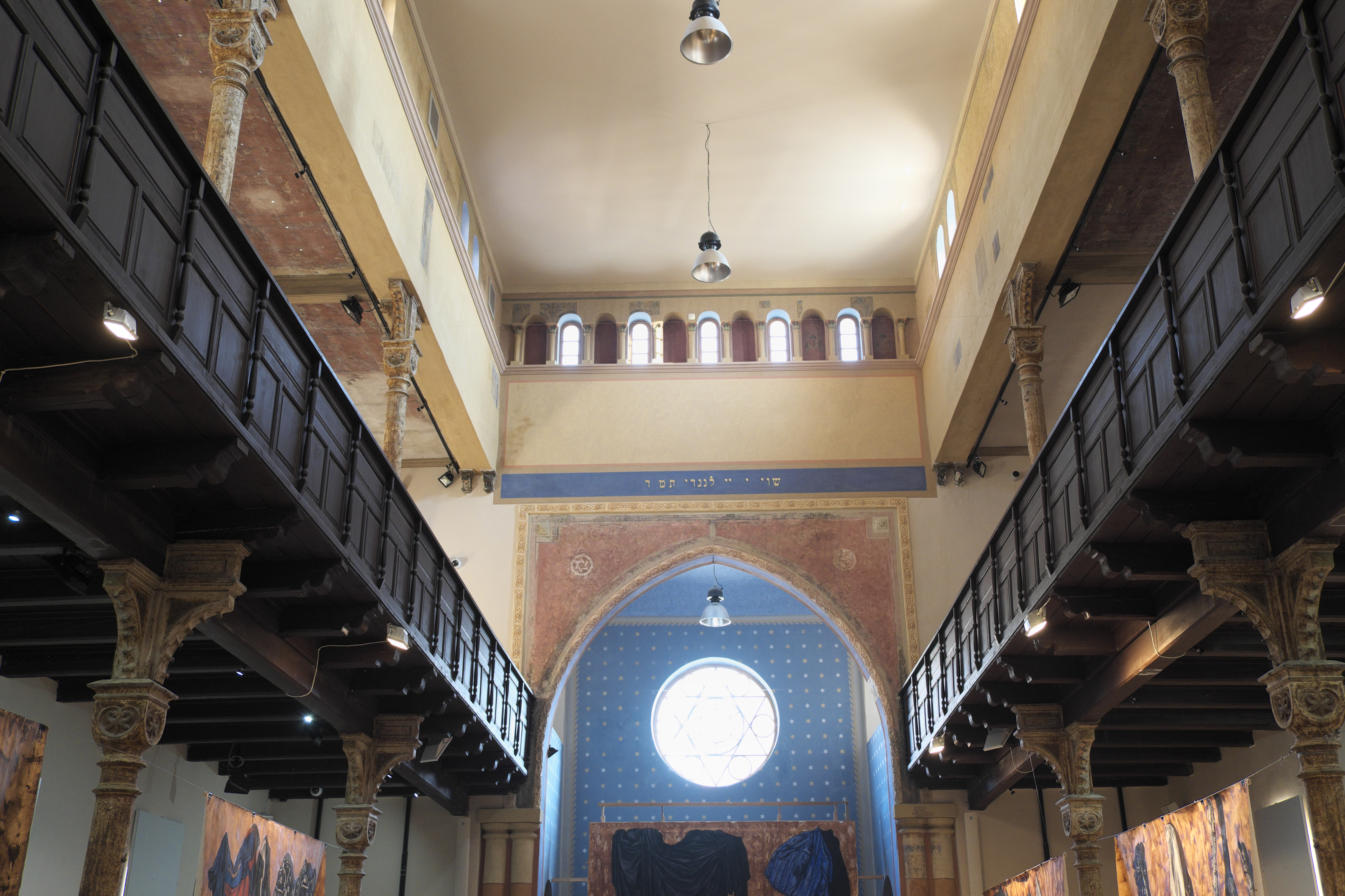 Ehemalige Synagoge Status Quo Ante, Halenárska 2, in Trnava (Slowakei), Innenraum